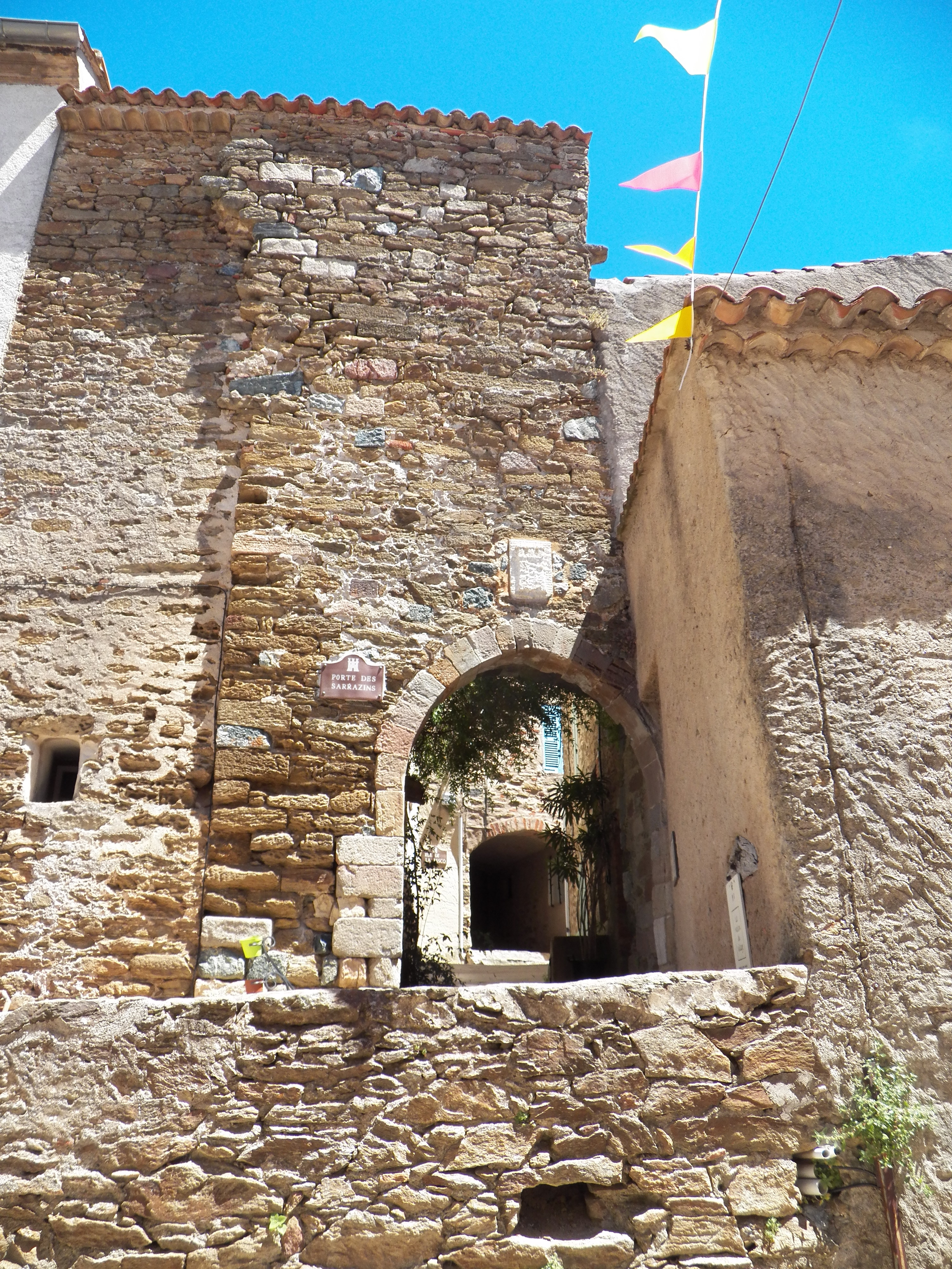 La porte des Sarrazins à Gassin, qui marquait l'entrée du fort médiéval